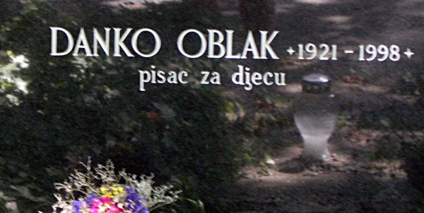 grob Danka Oblaka na zagrebačkom Mirogoju